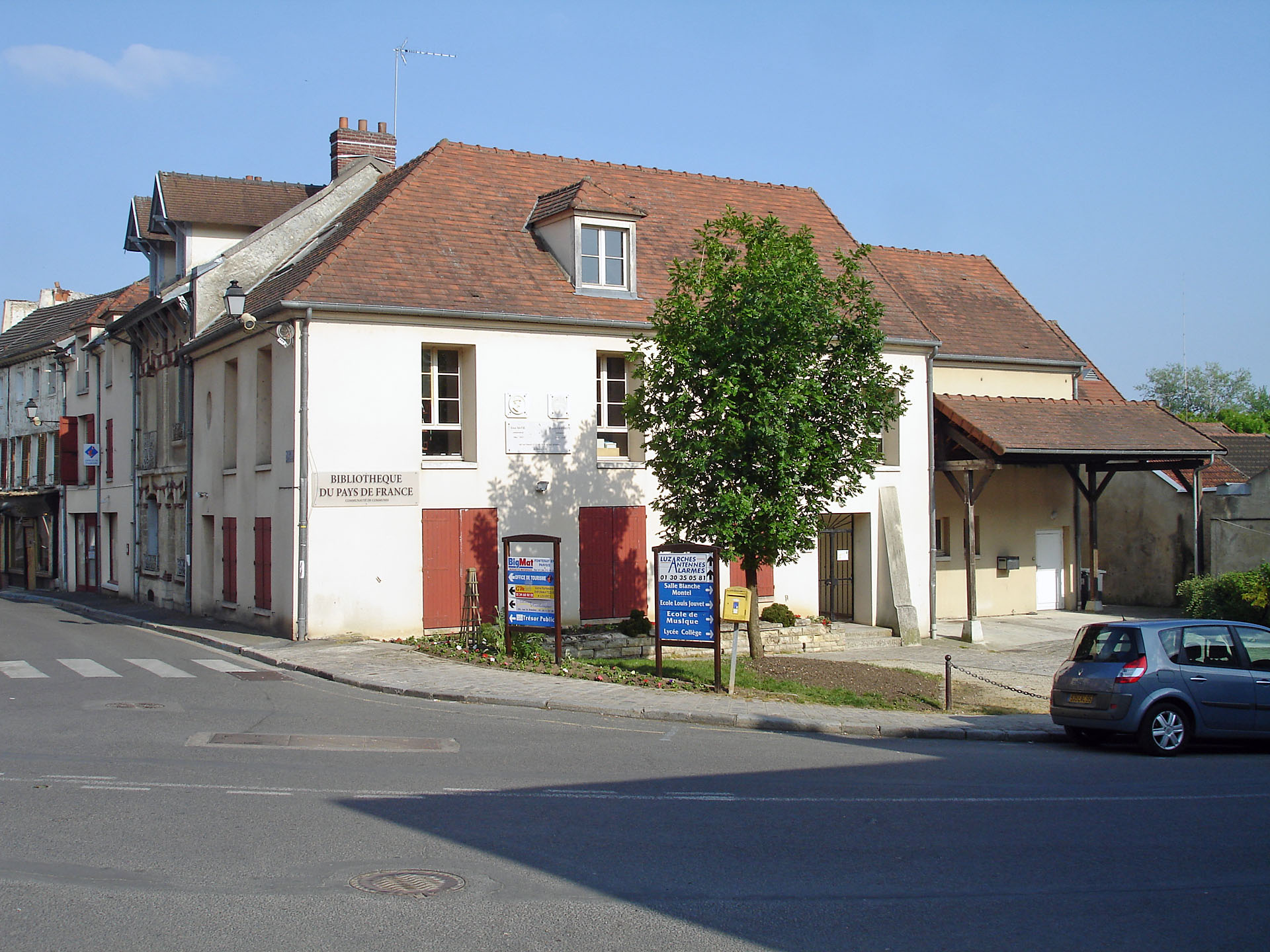 La bibliothèque du Pays de France à Luzarches, Val-d'Oise, France.